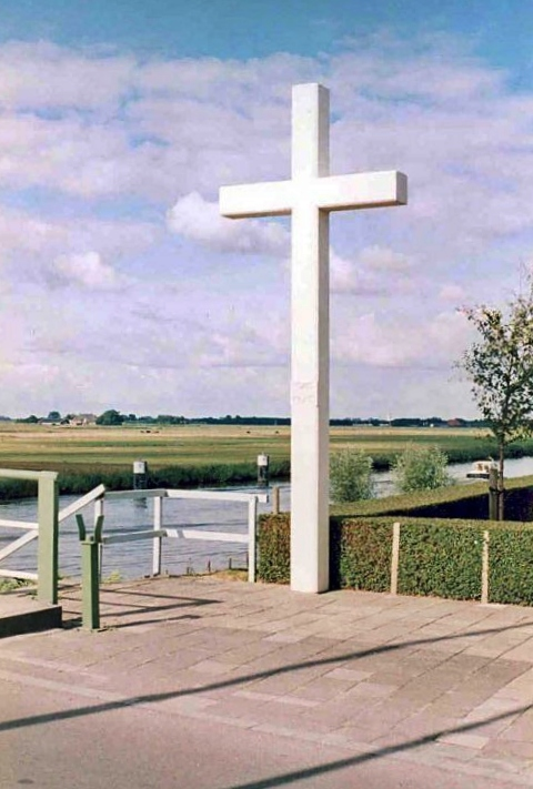 Pruis, Posthuma en Oostenbrug,1949